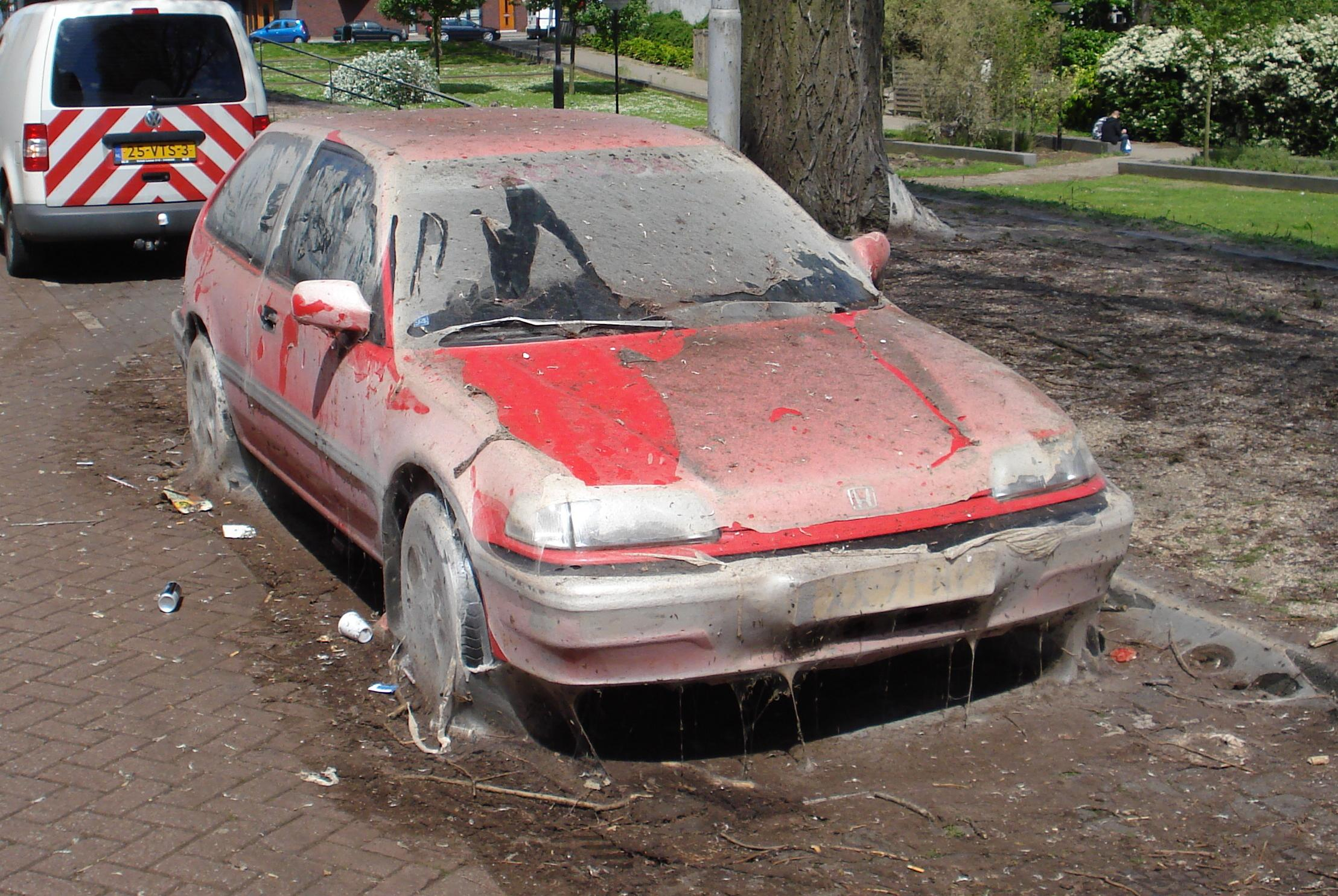 Rotterdam, Spinselmot aan de Spuikade.